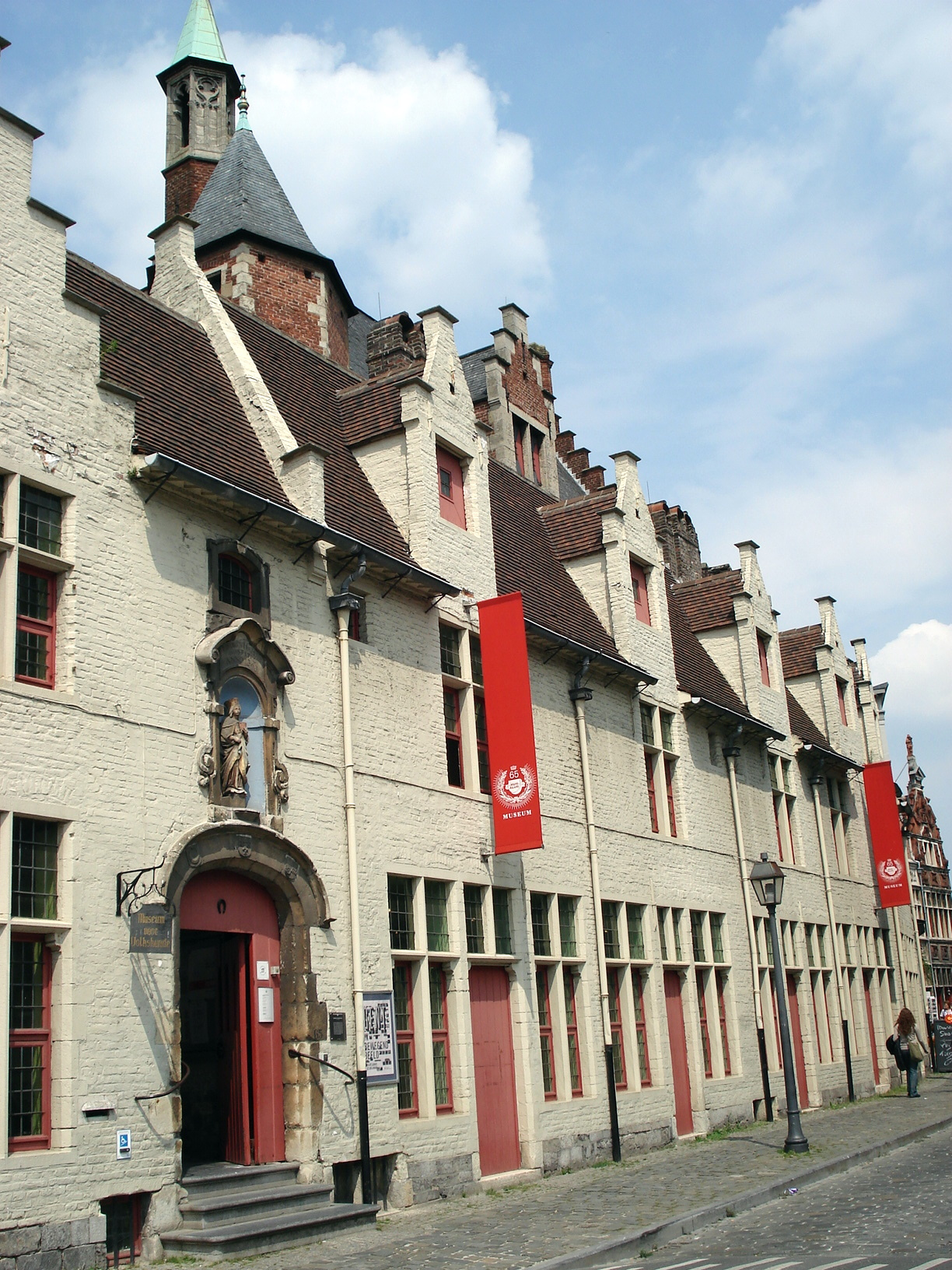 Gent, Kinderen Alijnshospitaal, voorgevel met acht godshuisjes. Ingangspoort met Sint-Catharinabeeld. Kapel (1543) steekt boven dak uit. Helemaal rechts op foto: huis Vliegend Hert. Gand, Belgique: hospice Alijn, 2e moitié 14e siècle. Façade avant, donnant sur le quai de la Lys. Huit 'maisons-Dieu' composent cette façade. La chapelle (1543) est visible au-dessus de la toiture.